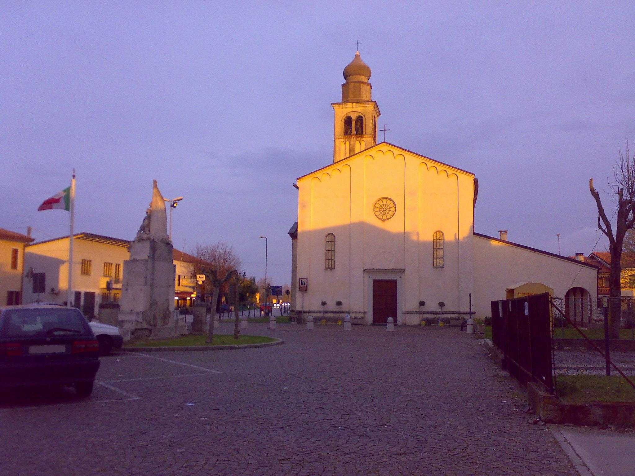 La chiesa di Villa del Bosco, fraz. di Correzzola